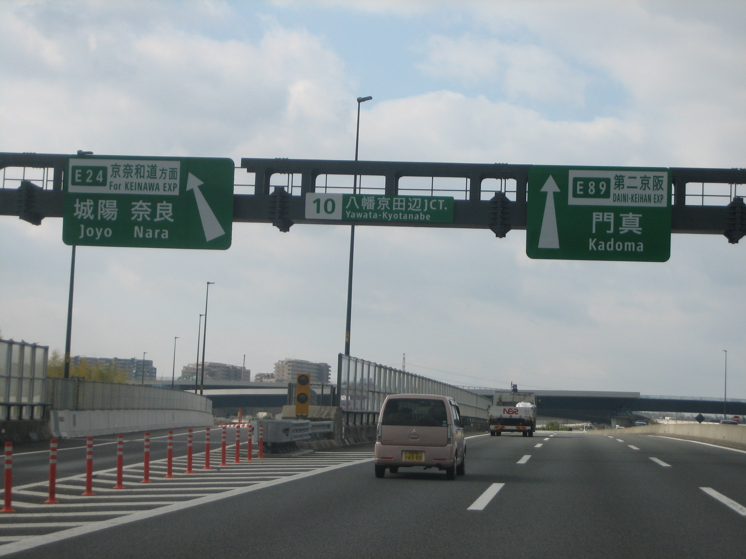 八幡京田辺JCT